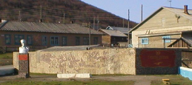 Бюст С. Вострецова в Аяне